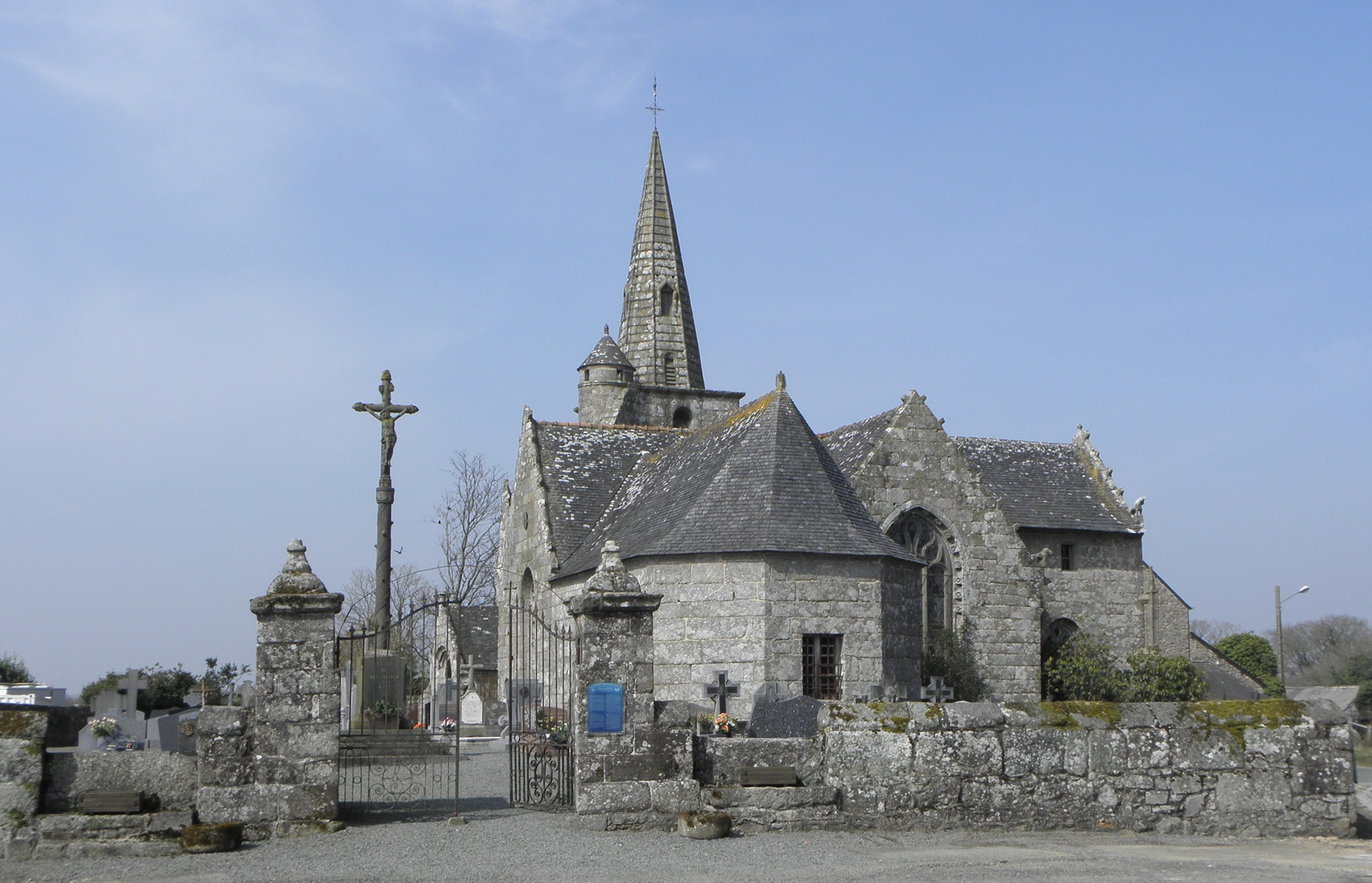 Chevet de l'église Saint-Gildas de Magoar (22).